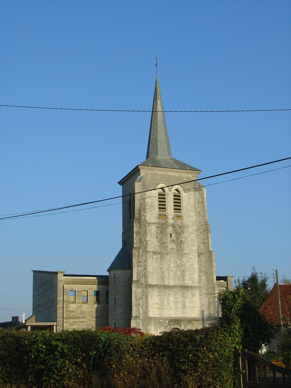 Église d'Œuf-en-Ternois